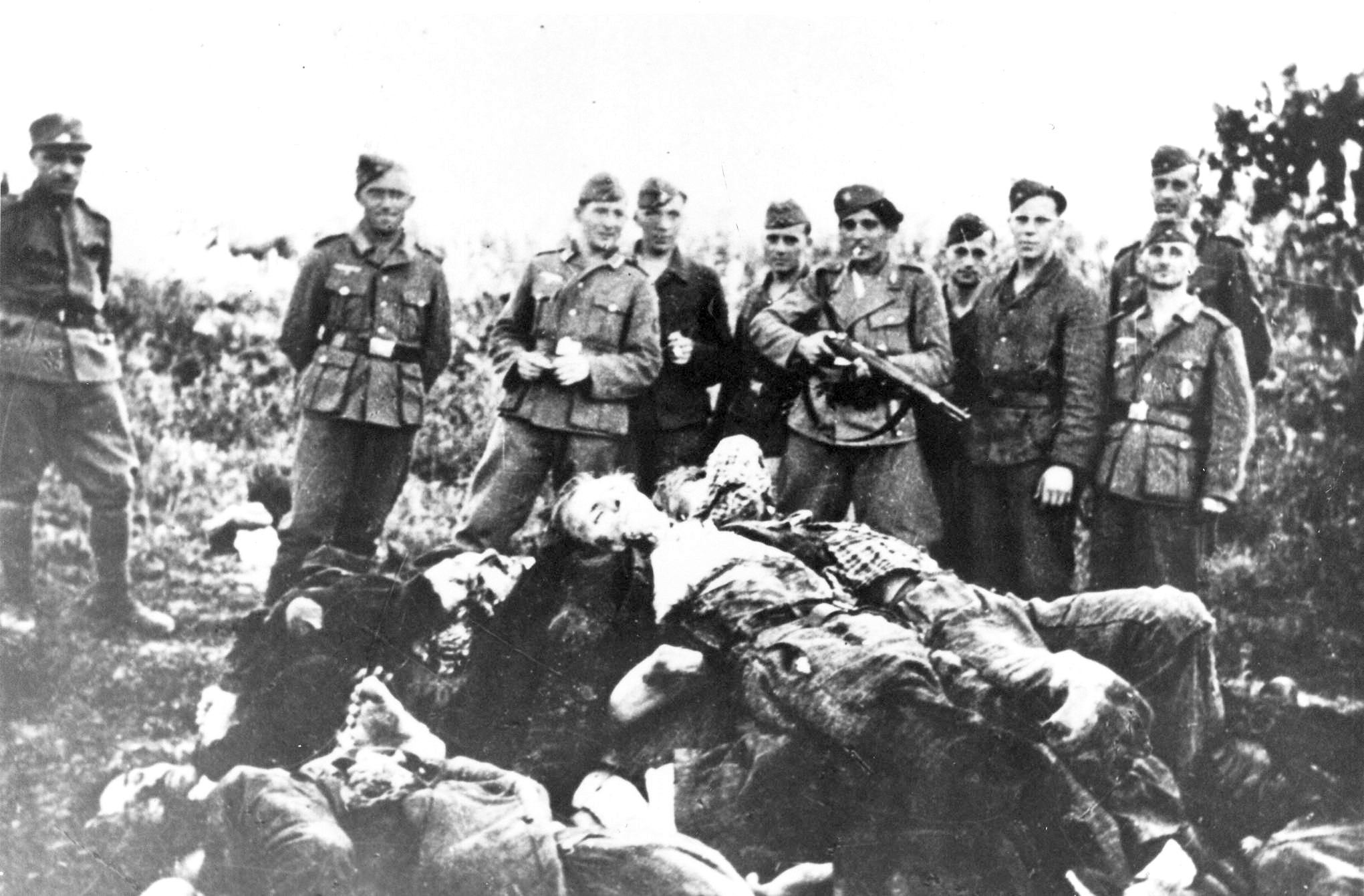 Srpskohrvatski / српскохрватски: Zločin ustaša nakon ofanzive na Kozari 1942.